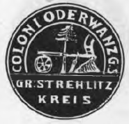 Altes Siegel des Ortes Oderwanz im Kreis Groß Strehlitz, Schlesien.